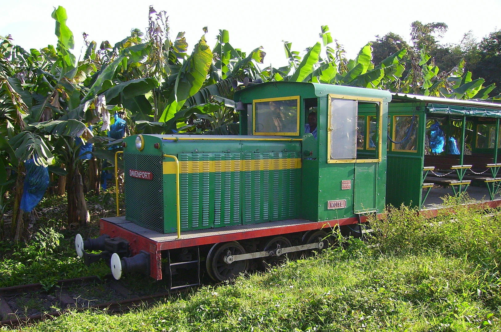 Le train des plantations à Sainte-Marie sur l'île de la Martinique le 6 mars 2010.